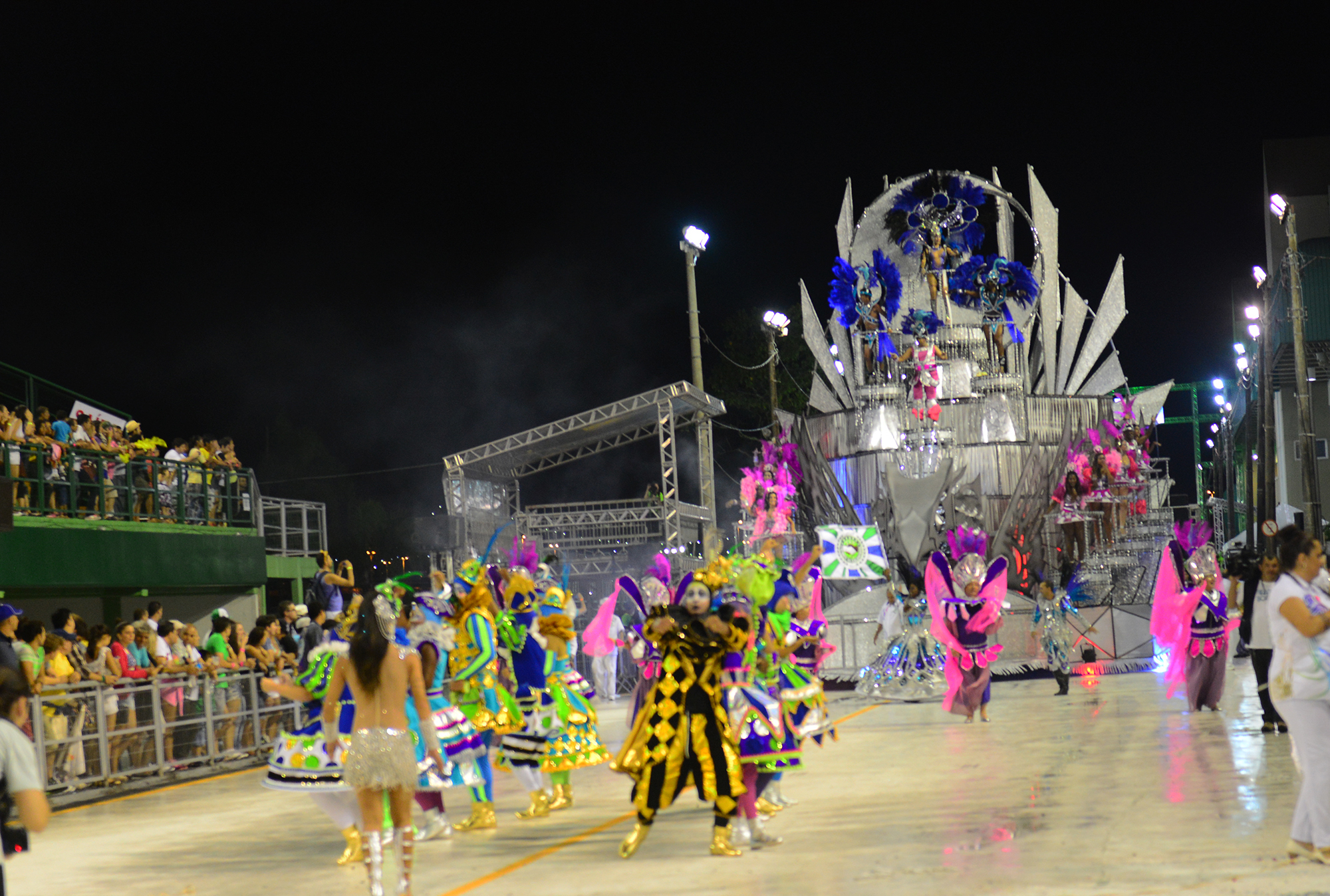 Unidos da Coloninha no Desfile das Campeãs de 2014. A escola foi a vice-campeã do carnaval.